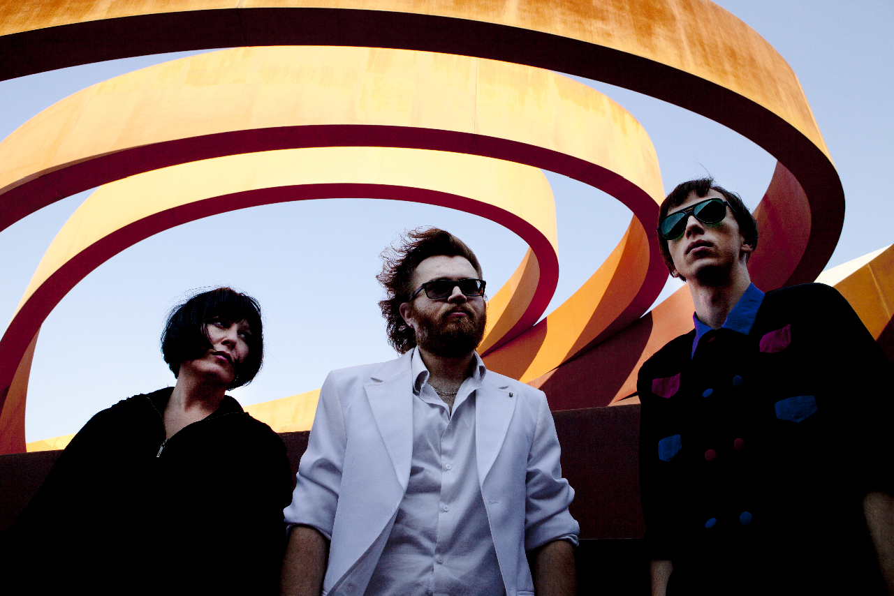 להקת ג'וריתמיקס